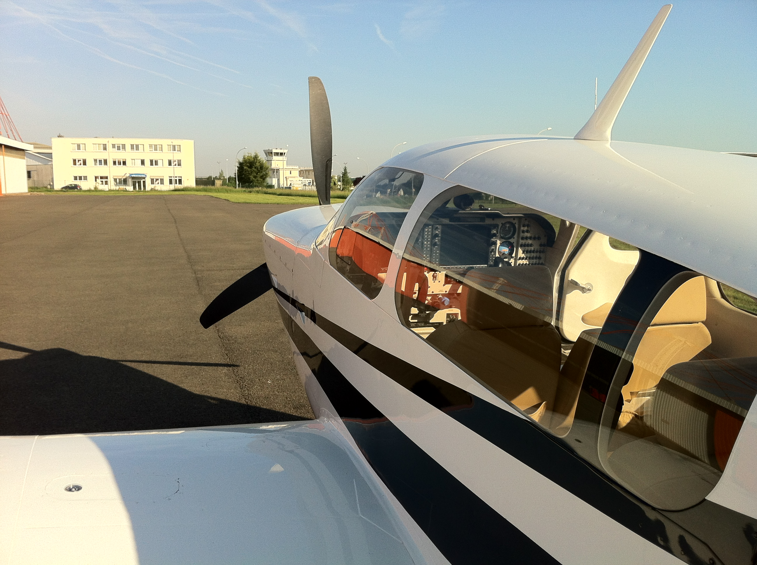 Vue de l'aéroport de Toussus le Noble et de sa tour depuis le parking Farman.